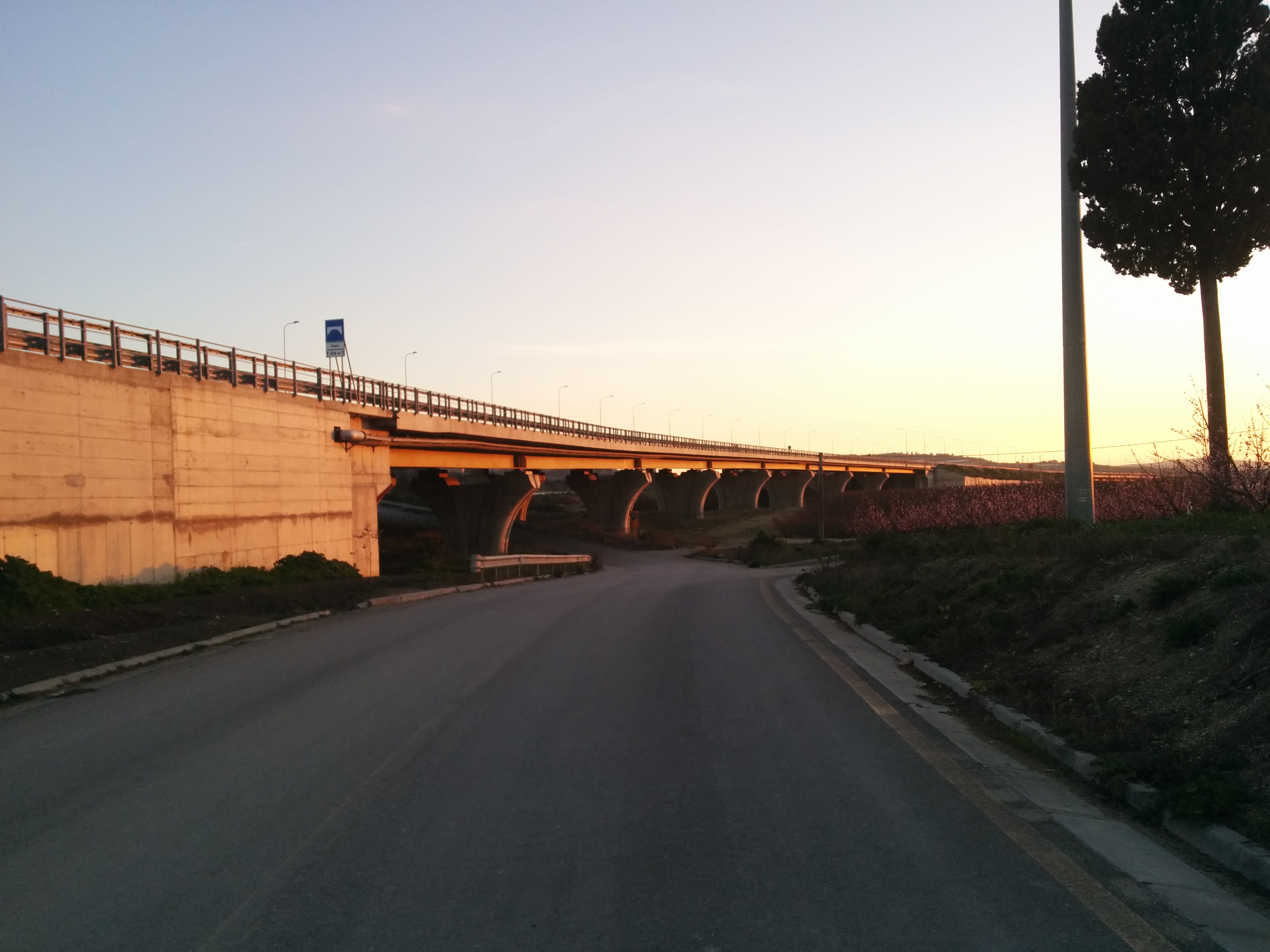 Il viadotto "Fazio" sulla strada statale 640 degli Scrittori.